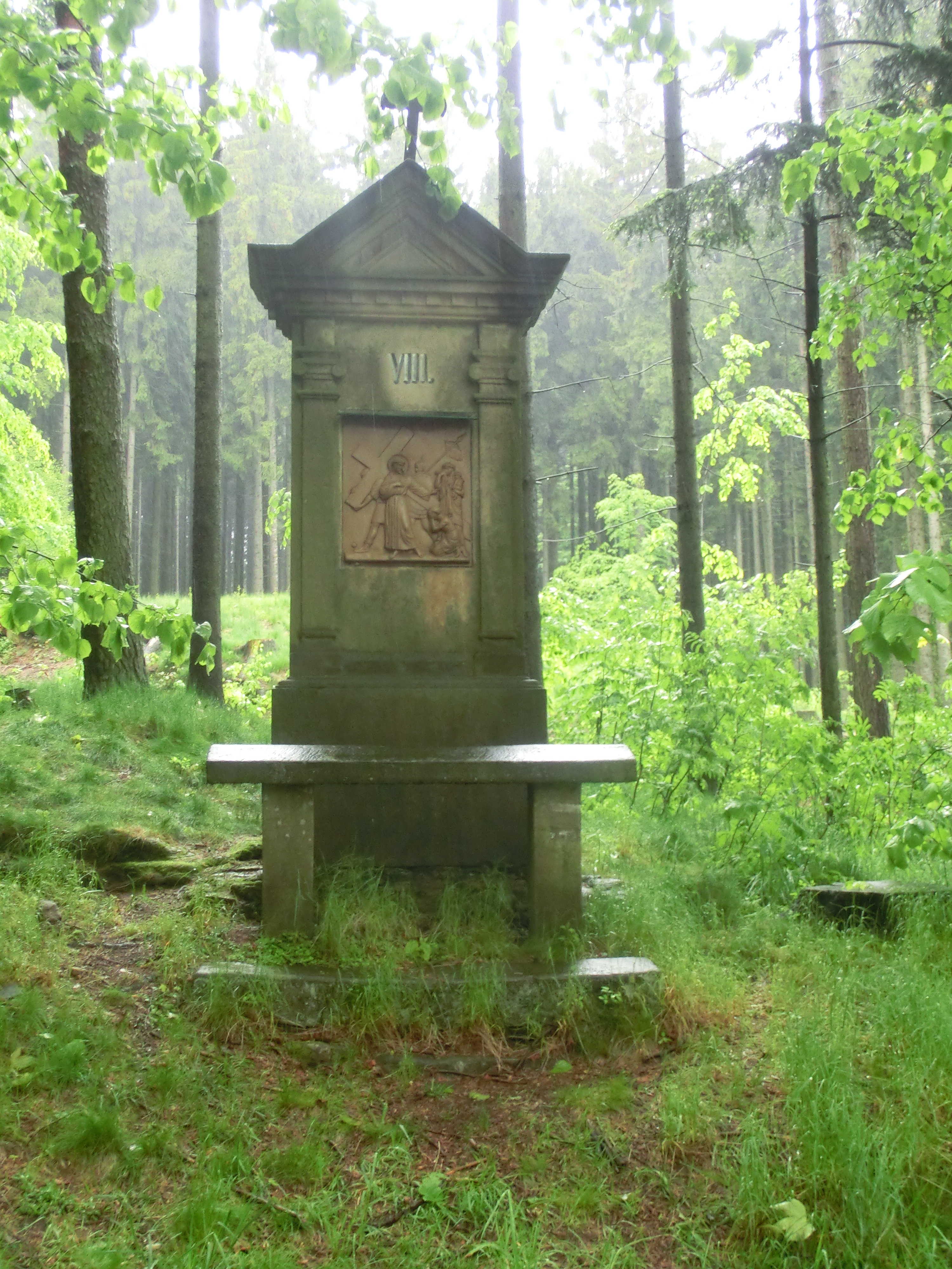 Suchý Důl, Ticháčkův les